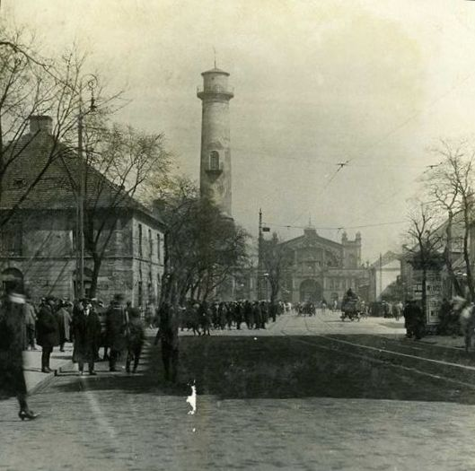 Ulica Chłodna w Warszawie, widok w kierunku placu Mirowskiego